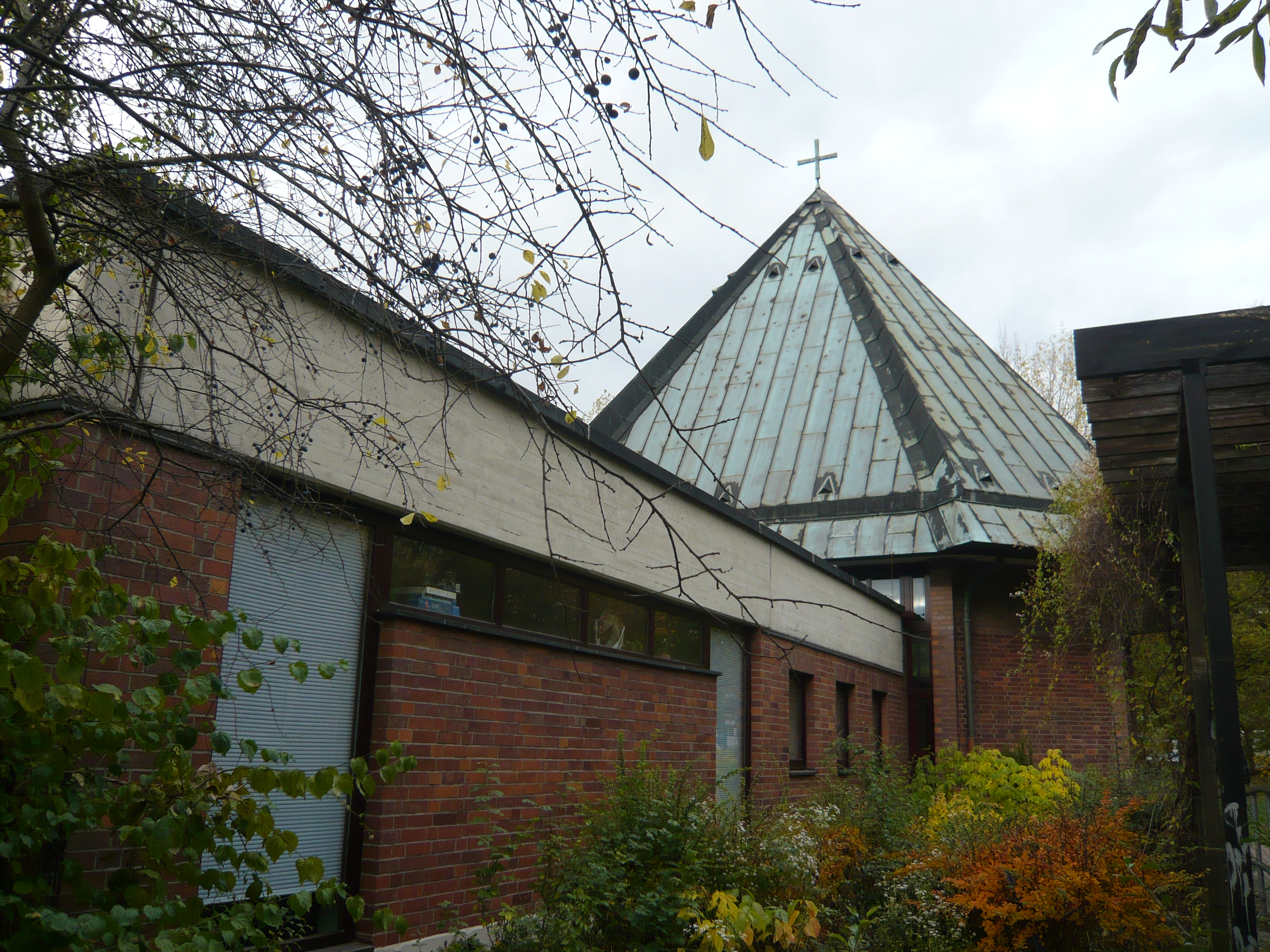 evangel. Gemeindezentrum Fennpfuhl